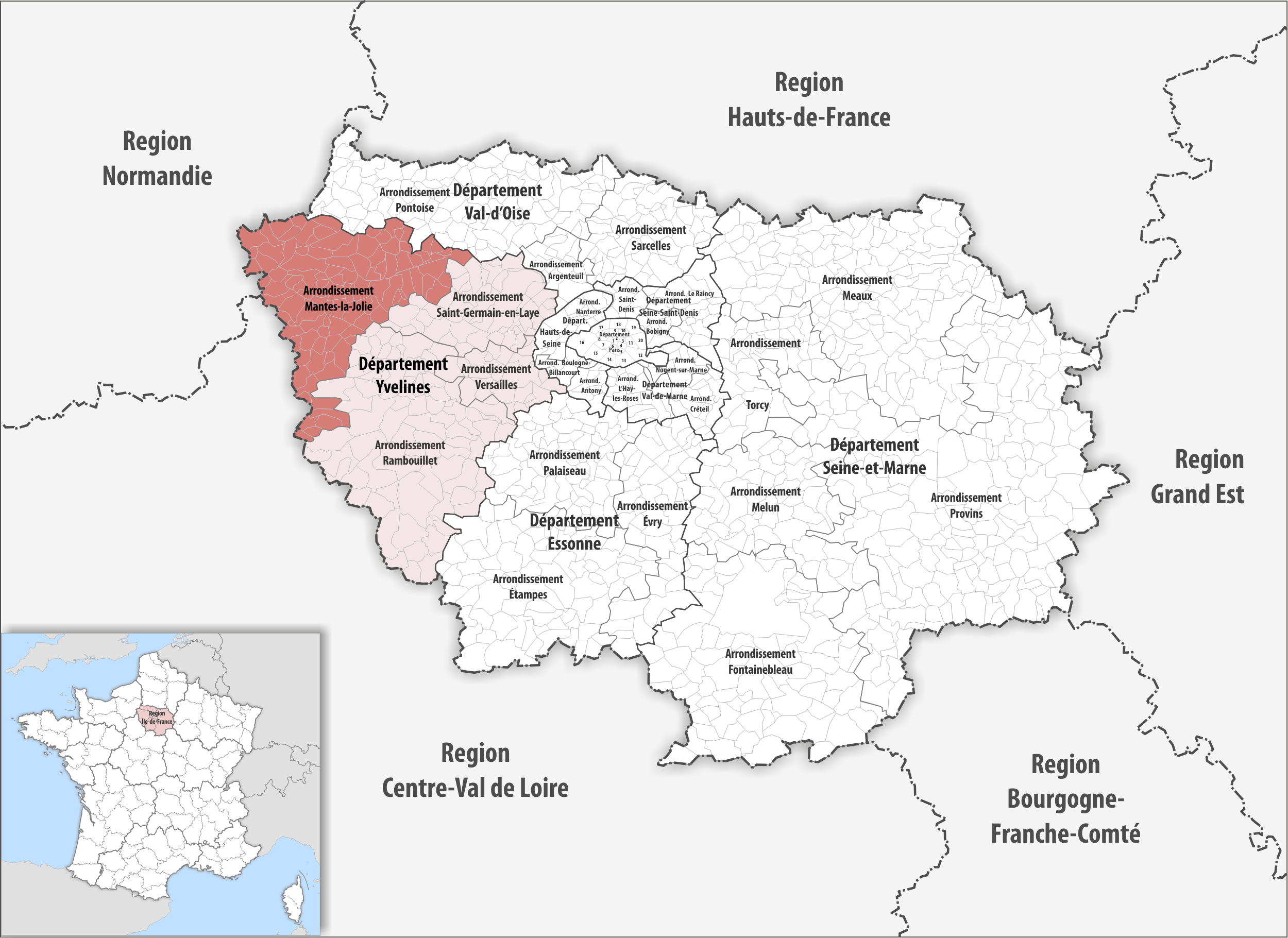 Lage des Arrondissements Mantes-la-Jolie